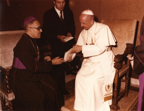 Monseñor Romero junto al papa Pablo VI. Aproximadamente un año antes de la muerte del pontífice.